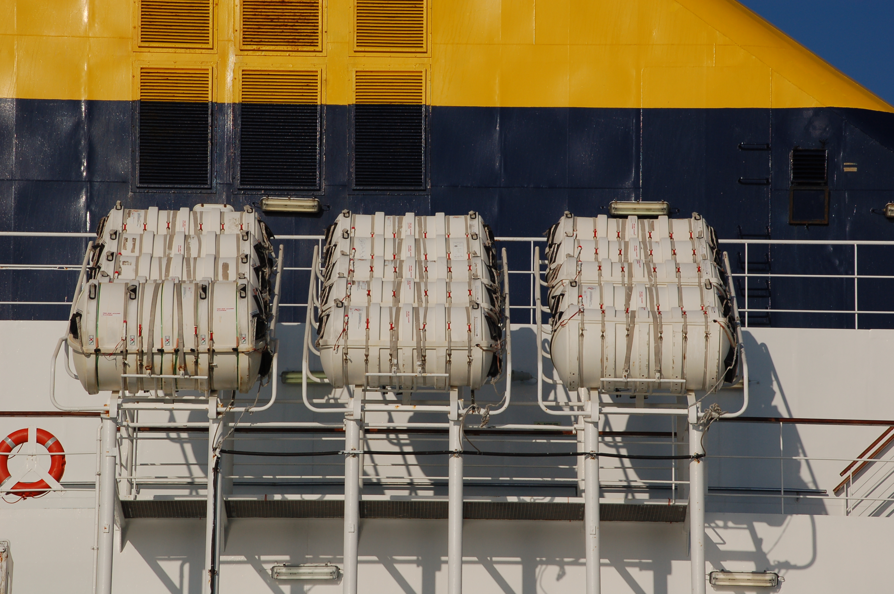 radeaux de sauvetage sur un ferry de Corsica Ferries